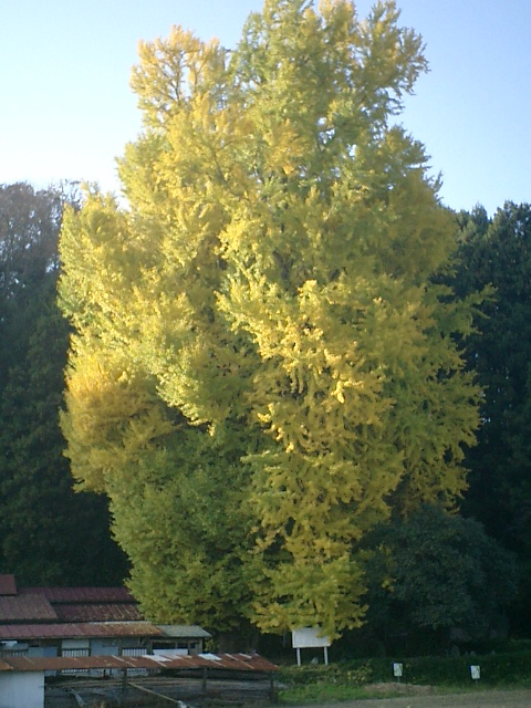 宮城県丸森町の大いちょう